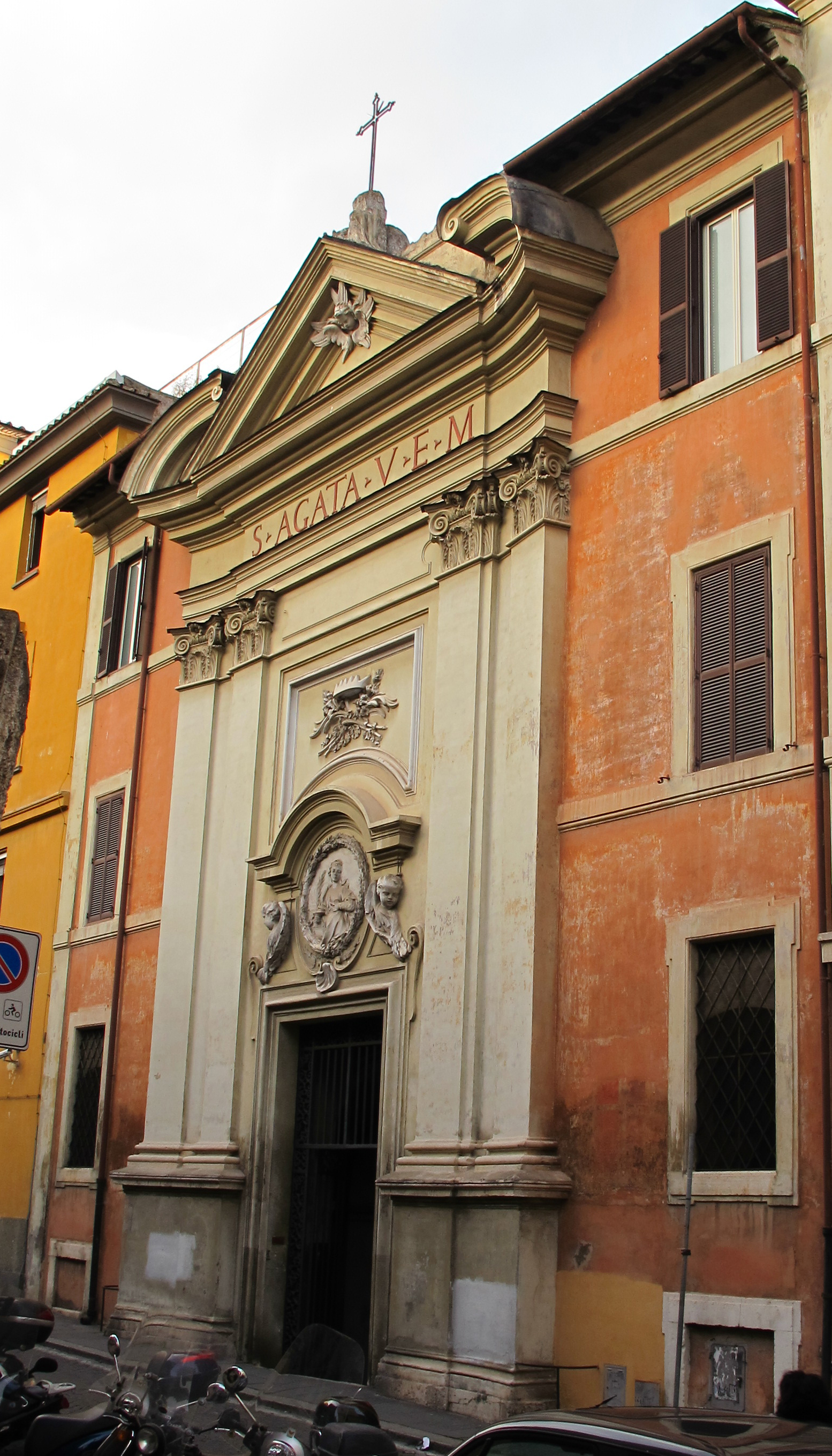 Sant'agata dei goti, ext.